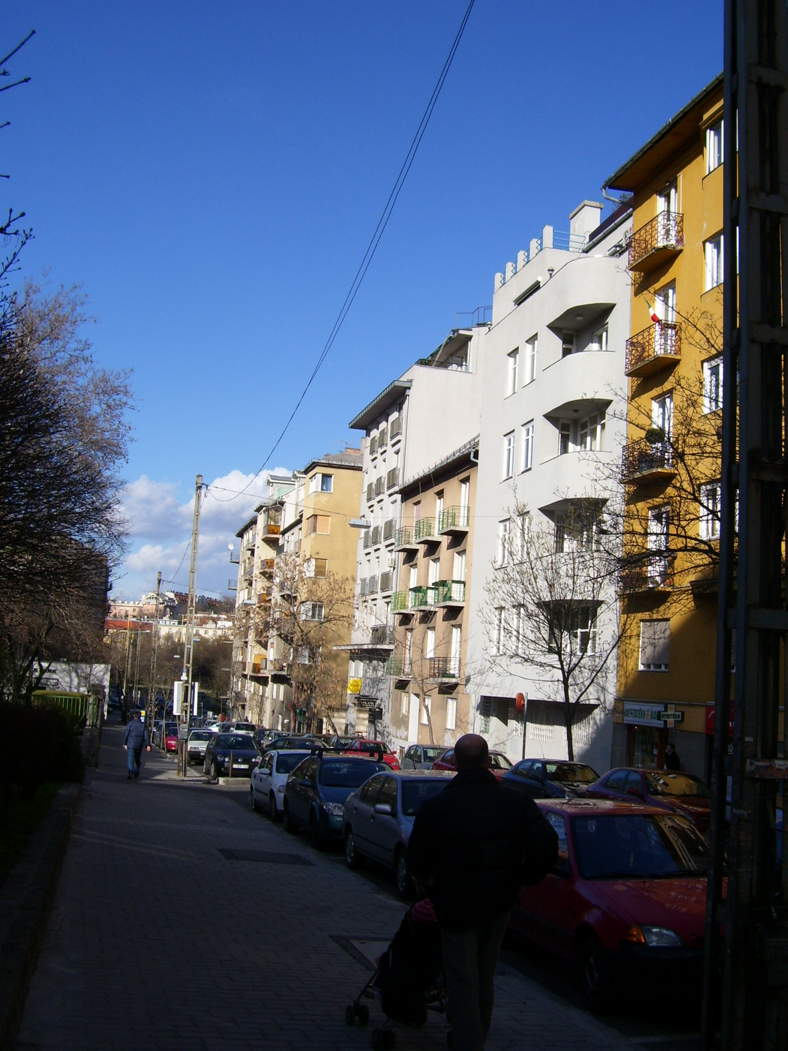 Budapest, XII. Kékgolyó utca 10. (épült: 1933-1934)